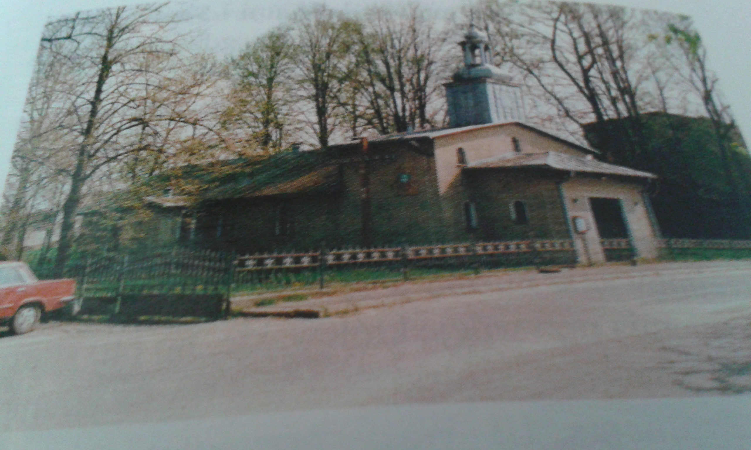 Stary Kościoł we Wręczycy niestety jest zburzony, na dzień dzisiejszy jest tam Plac Zabaw.